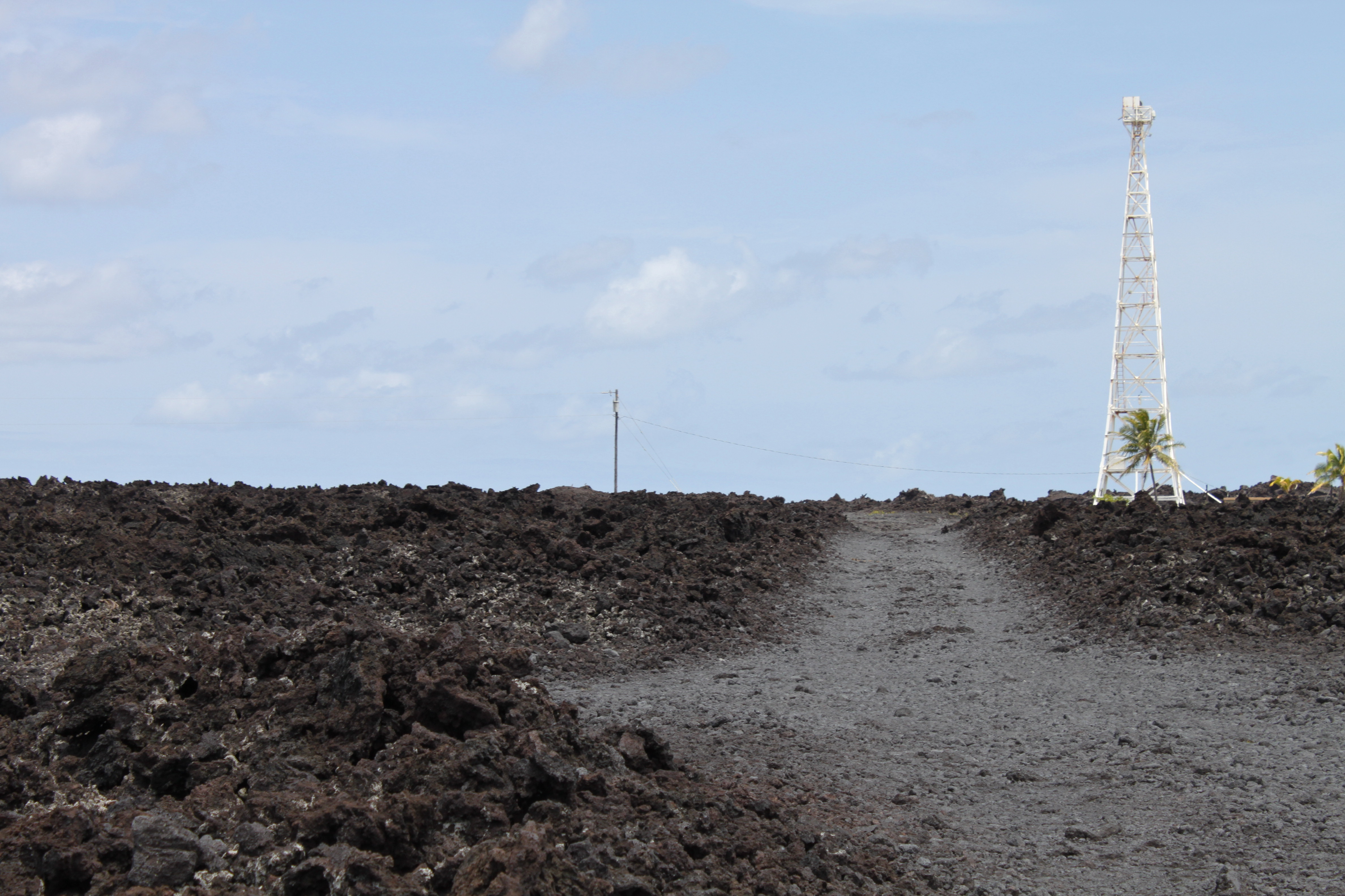 Hawaii: Cape Kumukahi Lighthouse